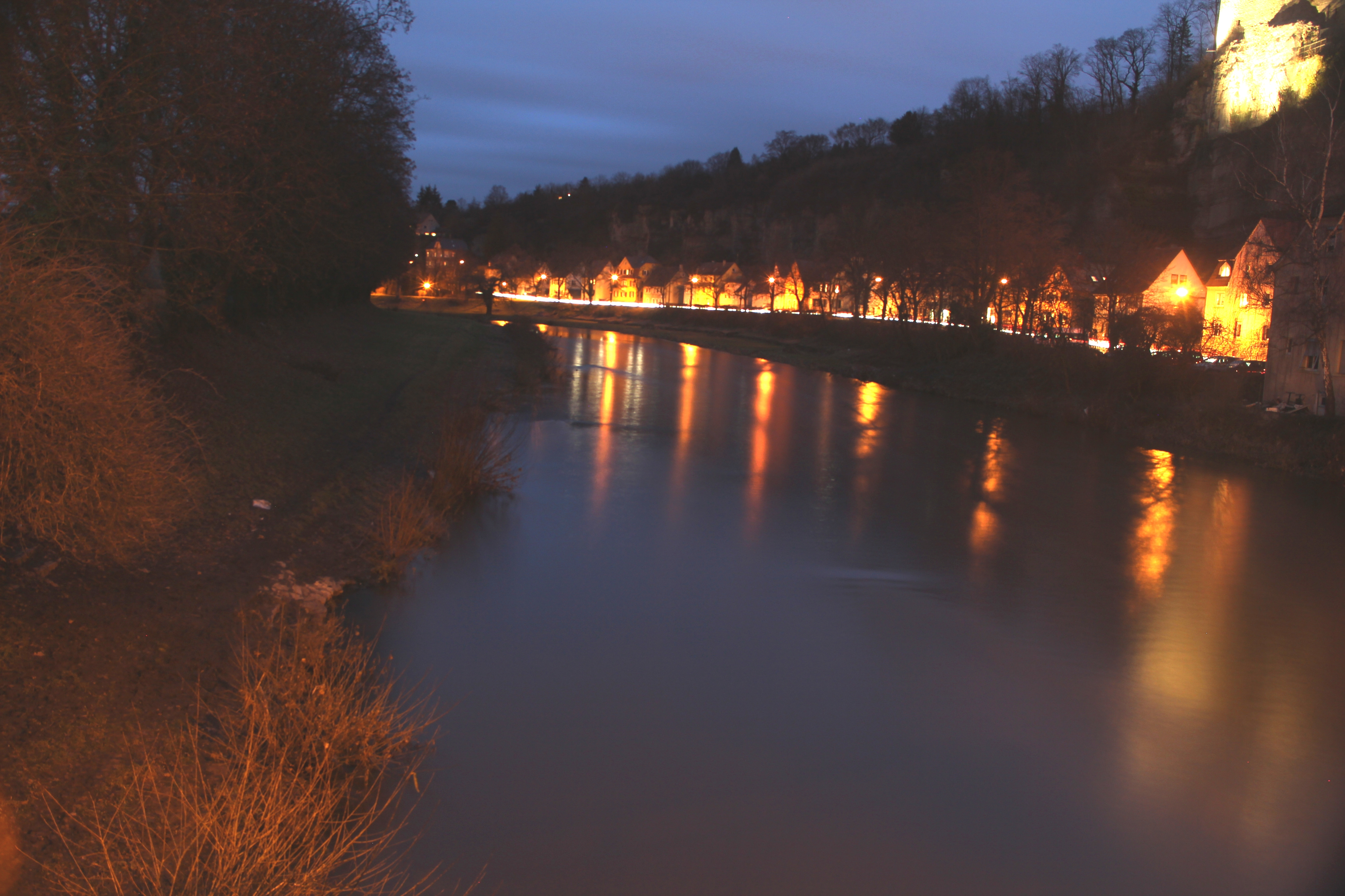 Blick auf die Enz bei Nacht. Oben rechts ist die Löffelstelz zu sehen (leider überbelichtet)